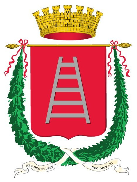 Stemma della Provincia di Verona